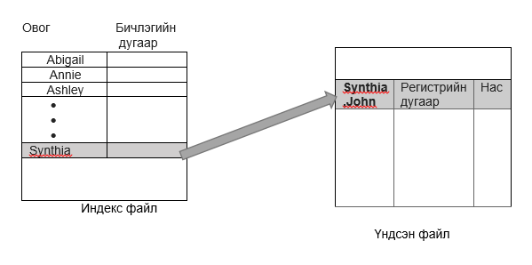 Монгол: Индекслэсэн хандалт